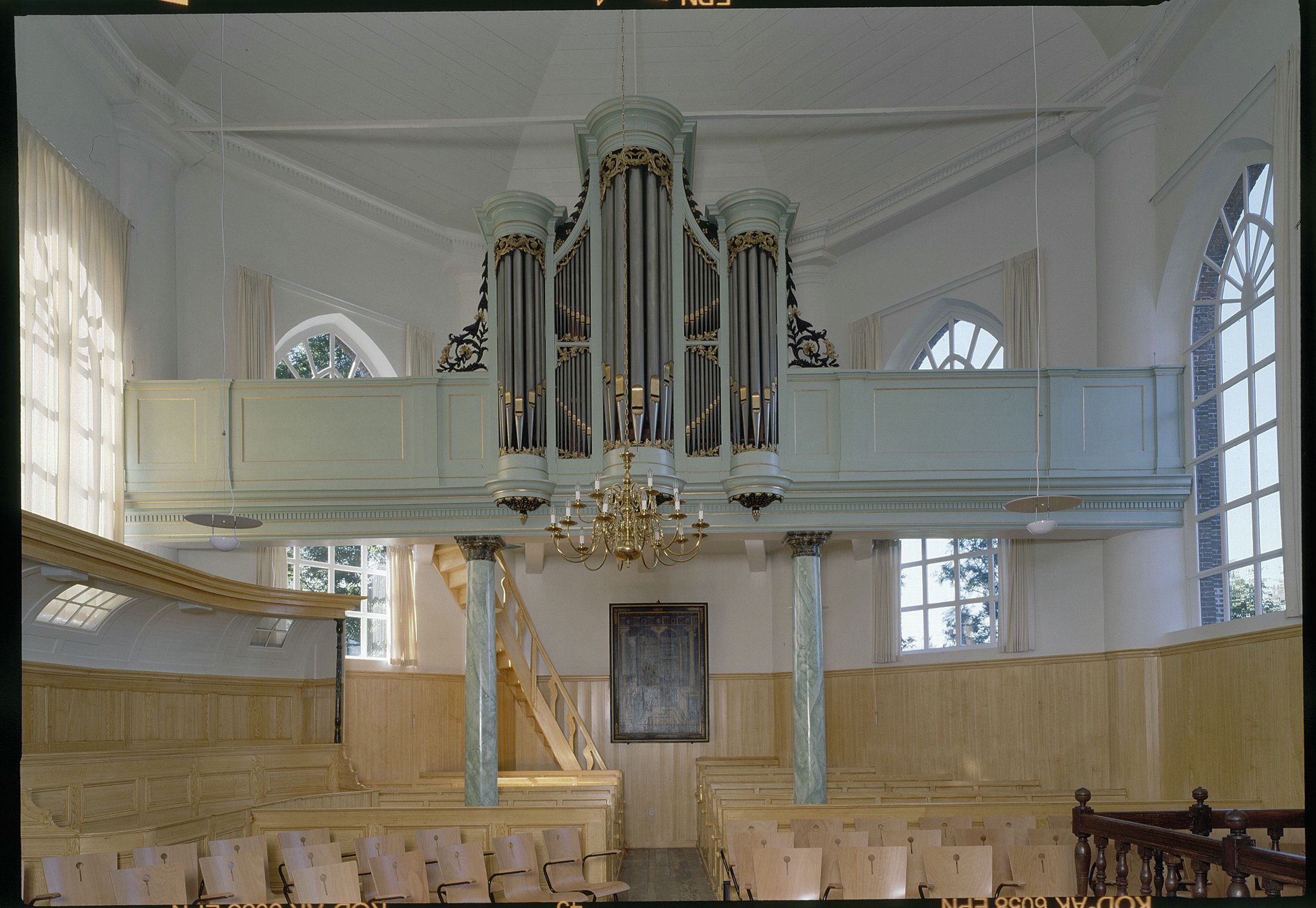 Nederlands Hervormde Kerk: Interieur, aanzicht orgel, orgelnummer 738 (opmerking: Gefotografeerd voor Het Historische Orgel in Nederland 1819-1840)